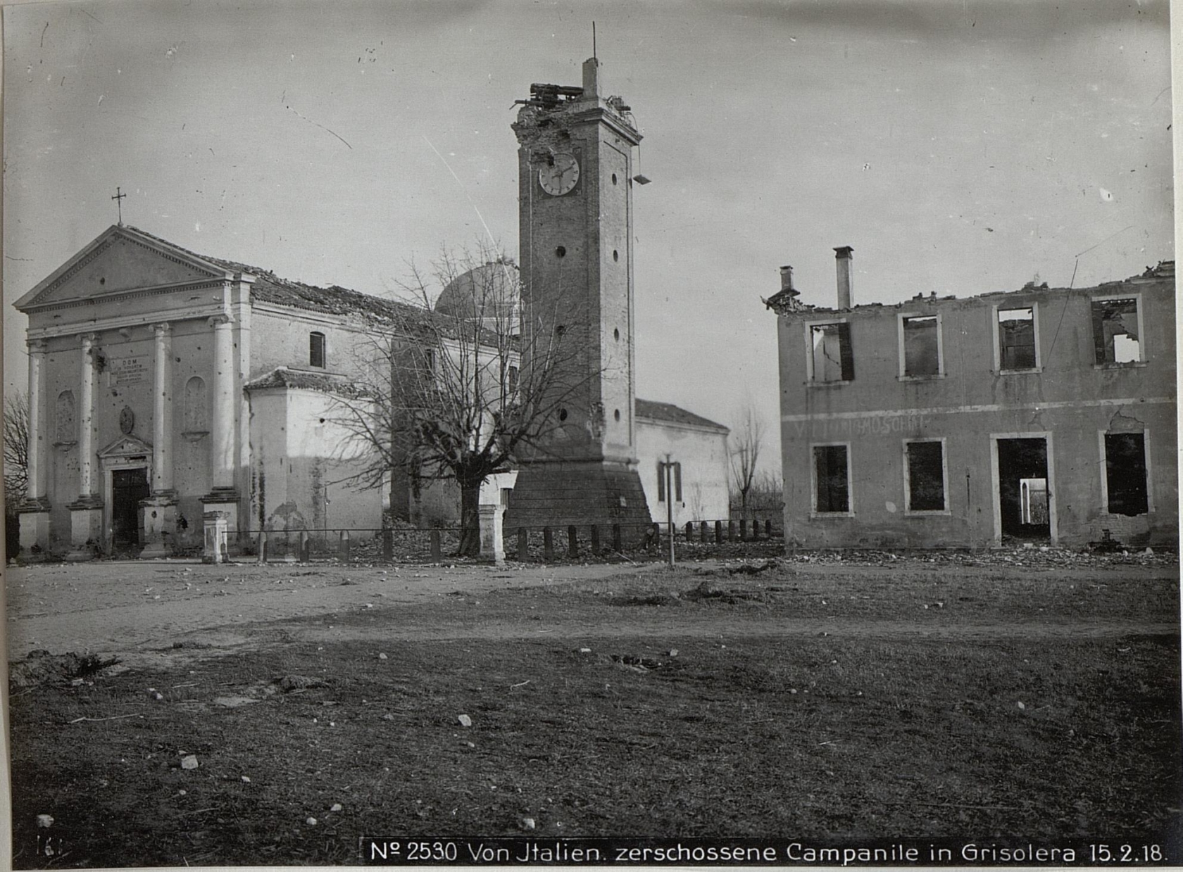 Von Italien.zerschossene Campanile in Grisolera 15.2.18.